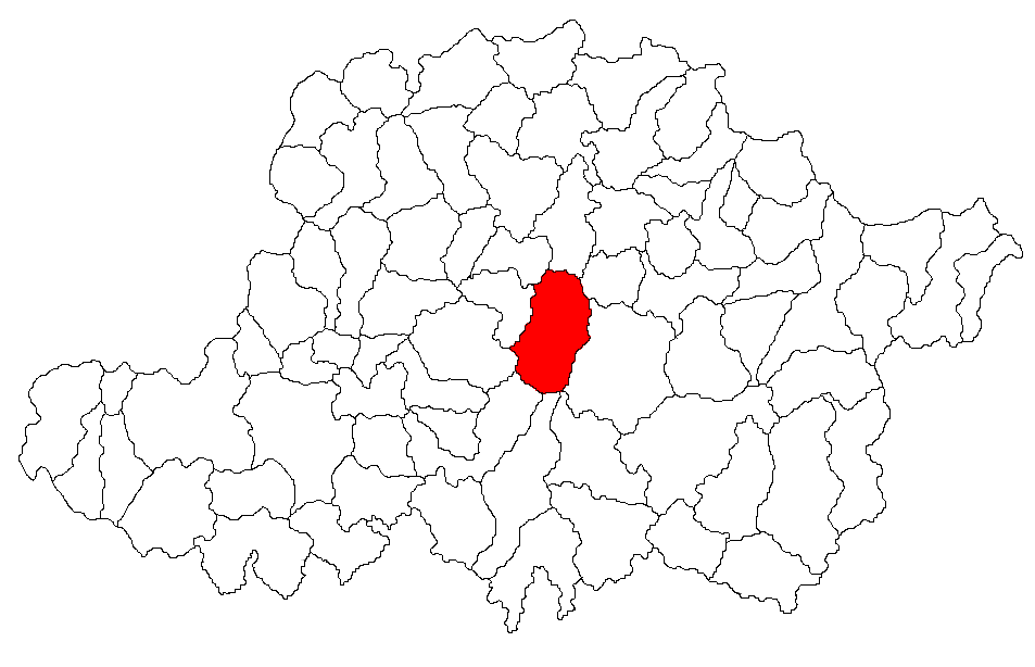 Categorie:Hărţi ale judeţului Arad